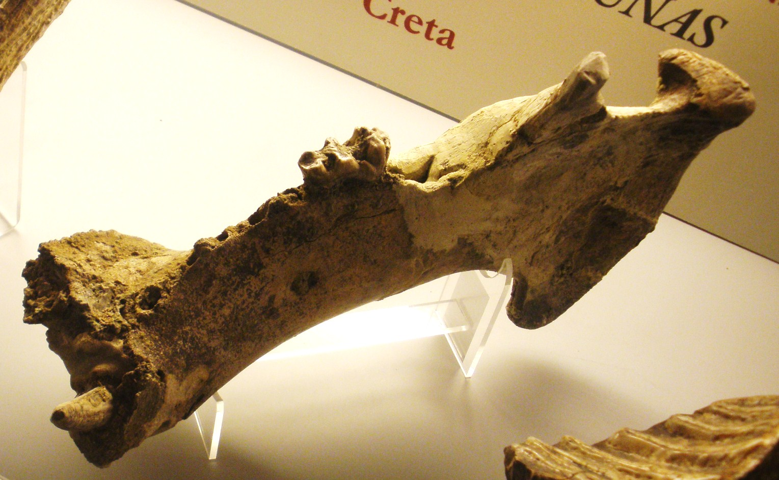 Fossil of Hippopotamus, an extinct mammal- Took the picture at Museo di Paleontologia di Firenze